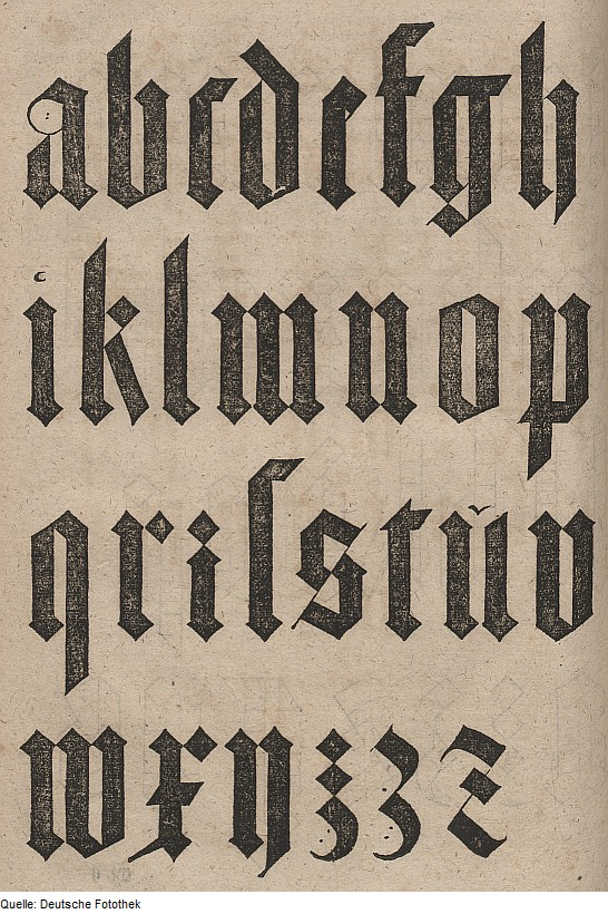 Original image description from the Deutsche FotothekGeometrie & Schrift